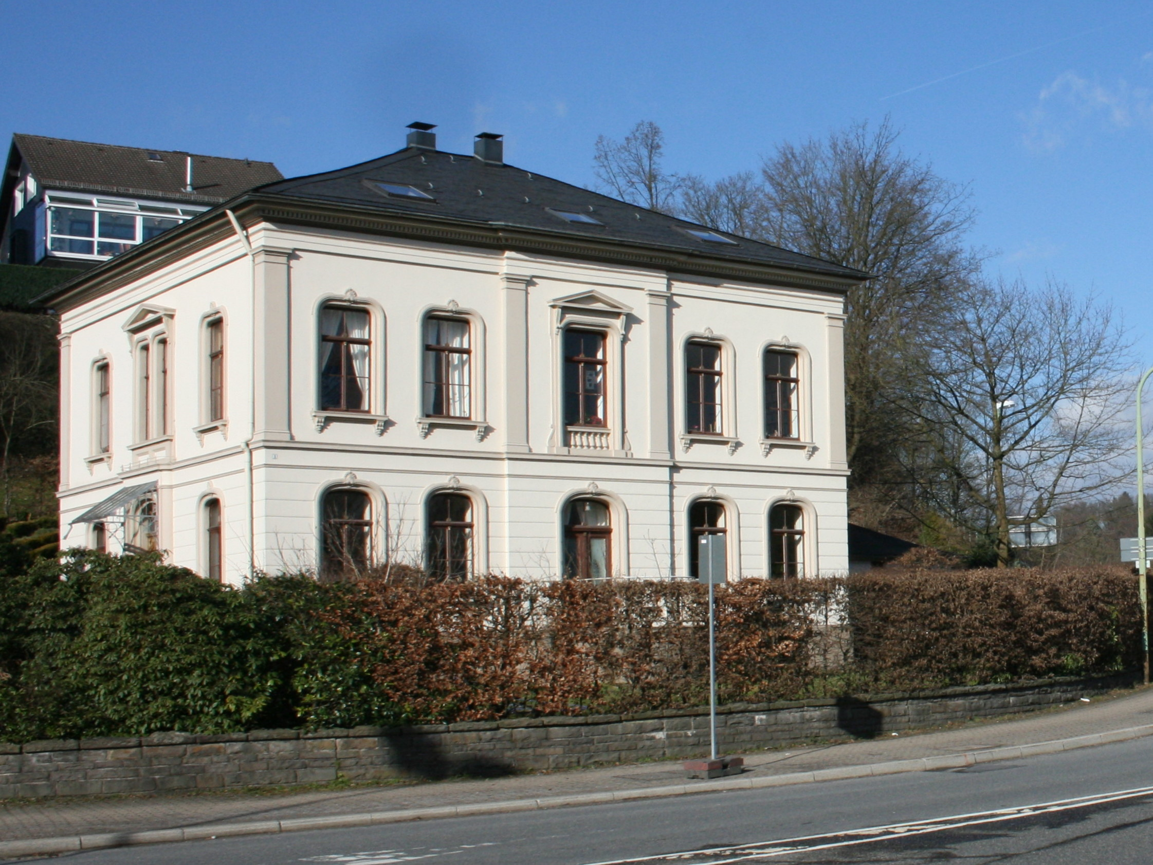 Villa Schnabel, Bachstraße 2a (früher: Rader Straße 1), Baudenkmal in Hückeswagen, erbaut zwischen 1860 und 1866.